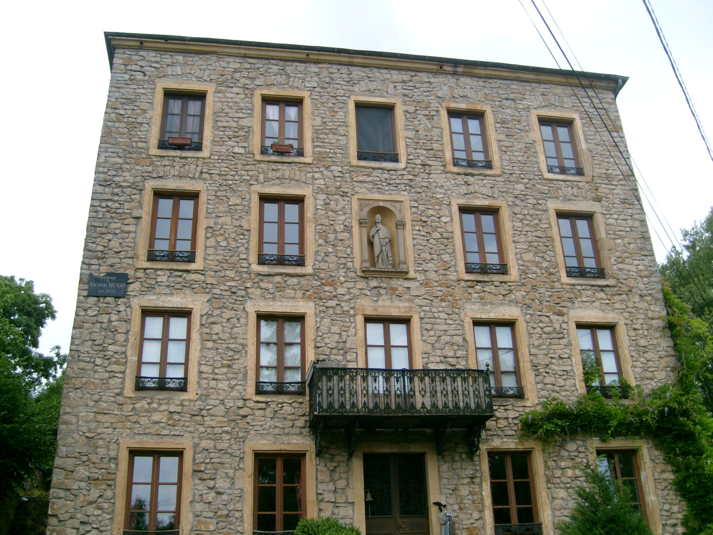 Sujet : Den "Hôtel de Paris" bei Altwis a Loutrengen (Frankräich), wou den Victor Hugo 1871 1 Mount zu Gaascht war. Auteur: lb : User: PlayMistyForMe Source: Eege Foto - 5. Juli 2008